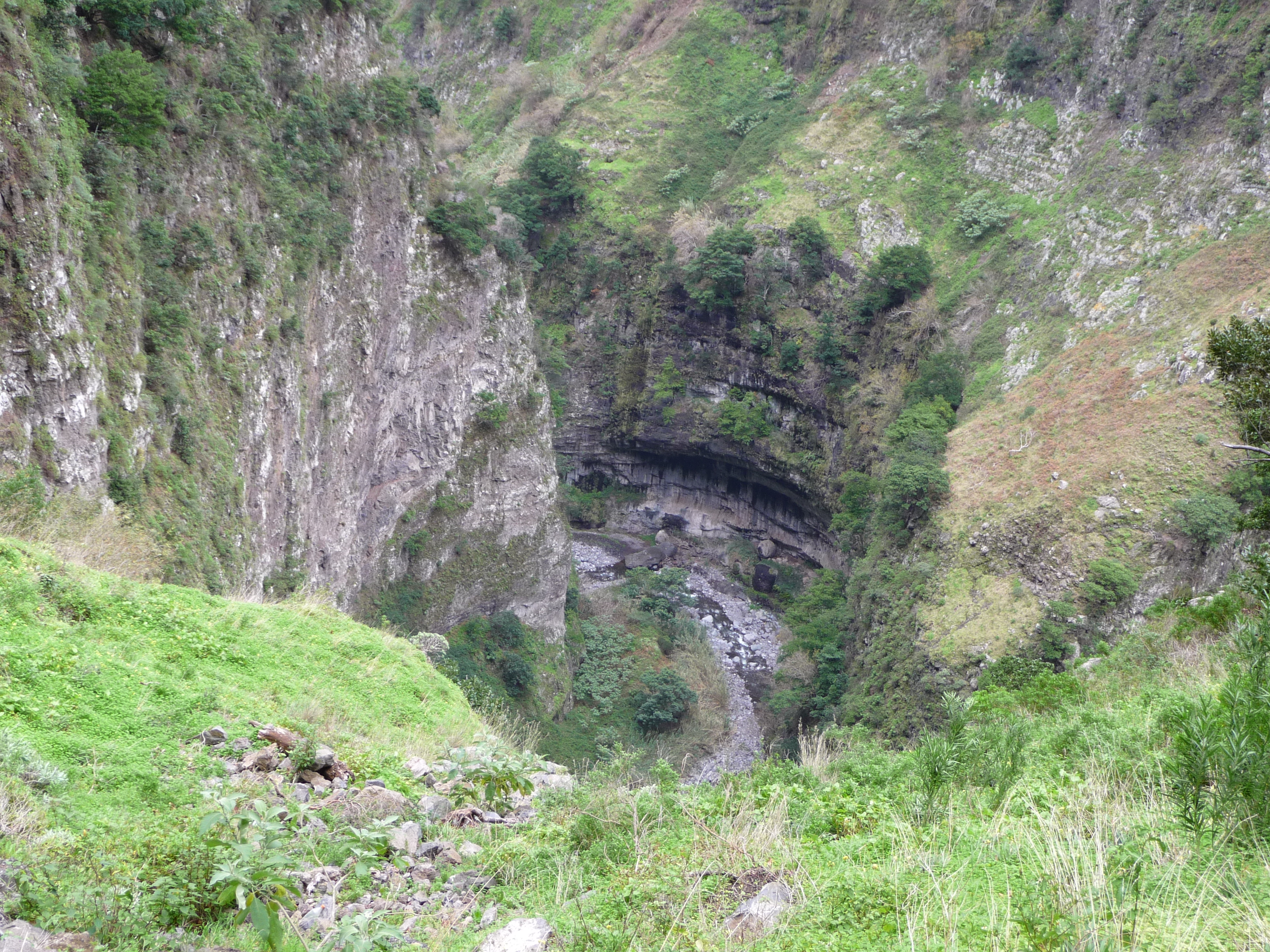 A Ribeira dos Seccoridos kanyonja Câmara de Lobos fölött (Terreiro da Luta, Madeira)